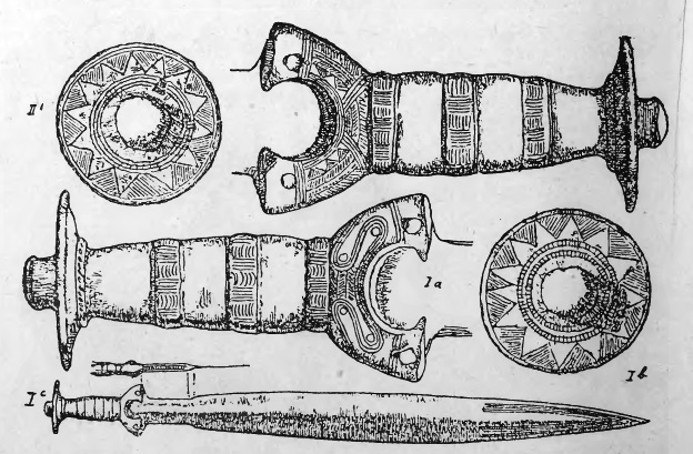 Бронзові мечі з Галичини (Комарники, пов. Турка, в Карпатах)—цїлий меч, ручки і головки мечів.